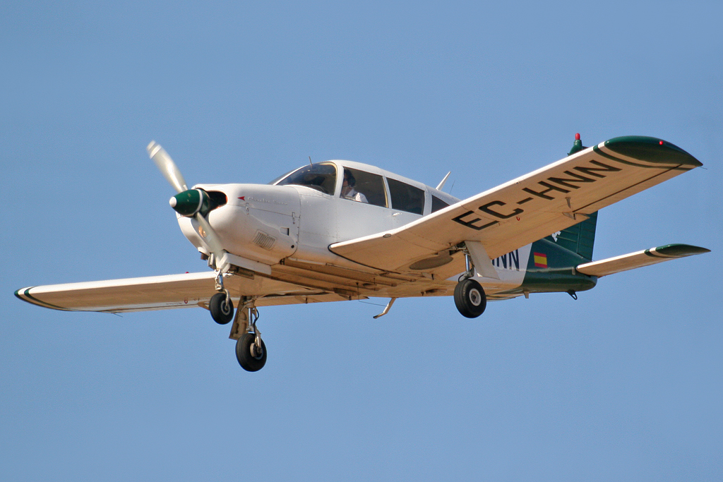 Sevilla SVQ/LEZL Airport